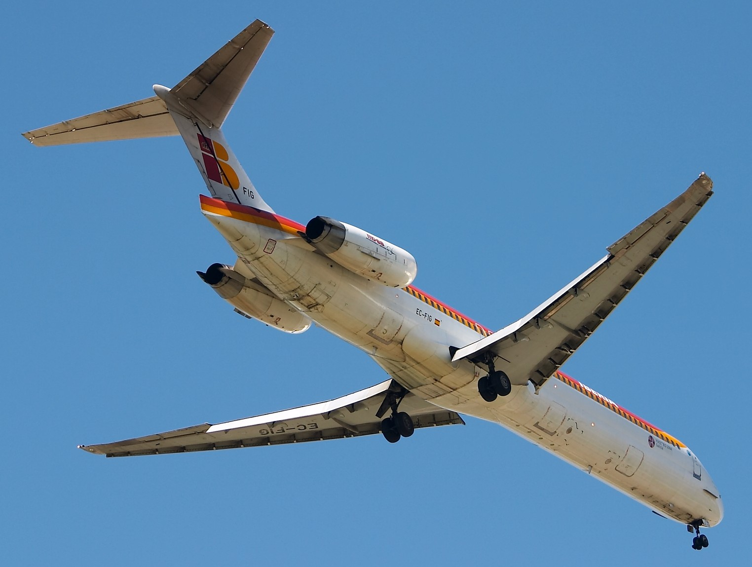 McDonnell Douglas MD-88 de Iberia a punto de aterrizar en la pista 33 del aeropuerto de Madrid Barajas.